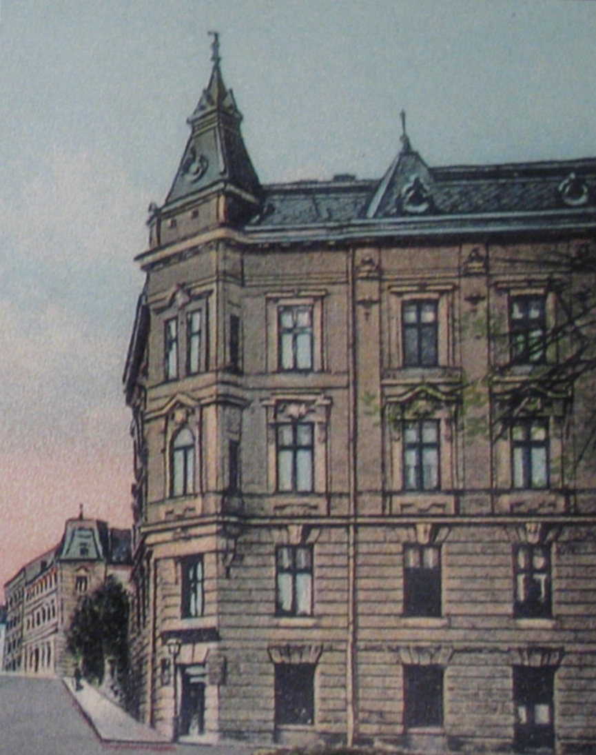 Bielsko, ul. Dąbrowskiego 6